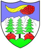 Wappen von Val-d’Illiez Kanton Wallis Schweiz